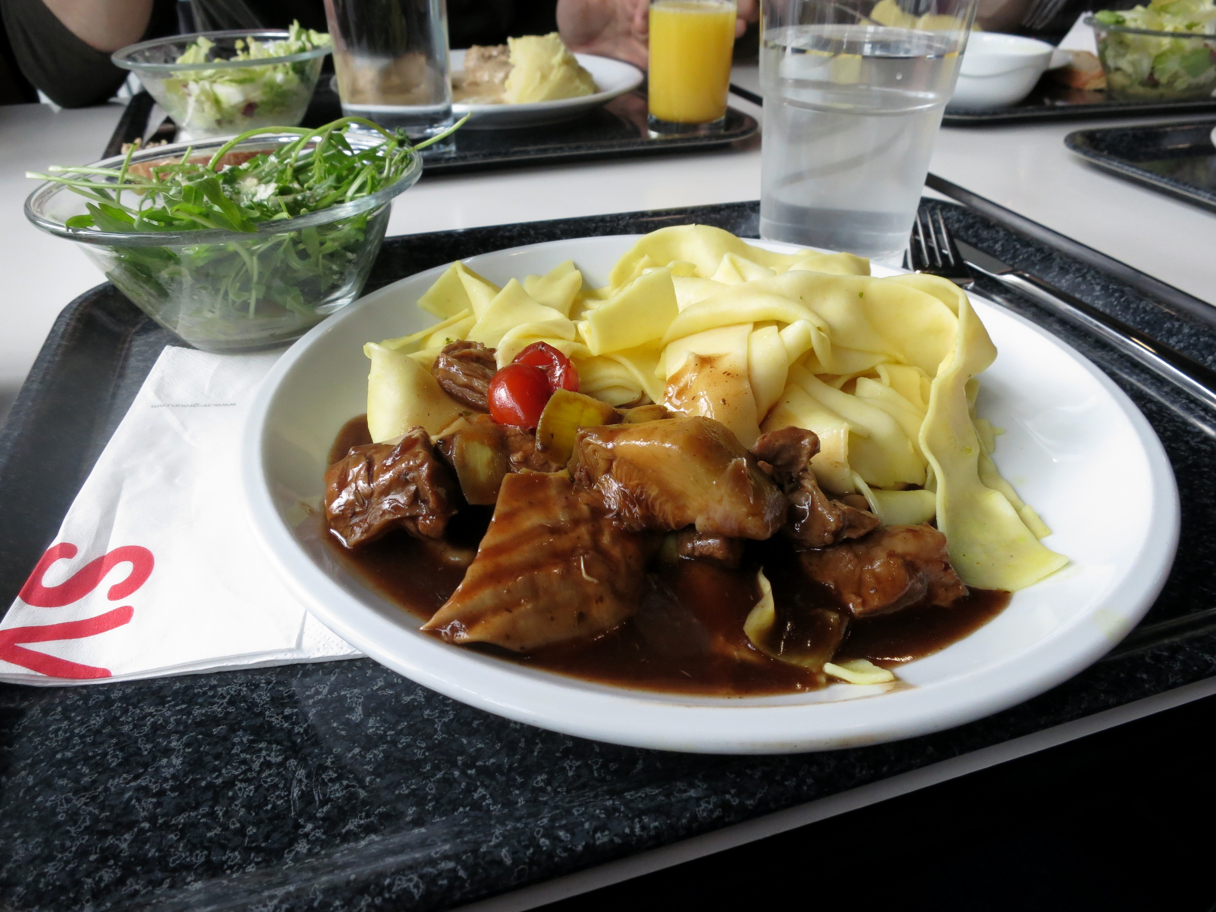 Kalbsvoressen mit Papardelle